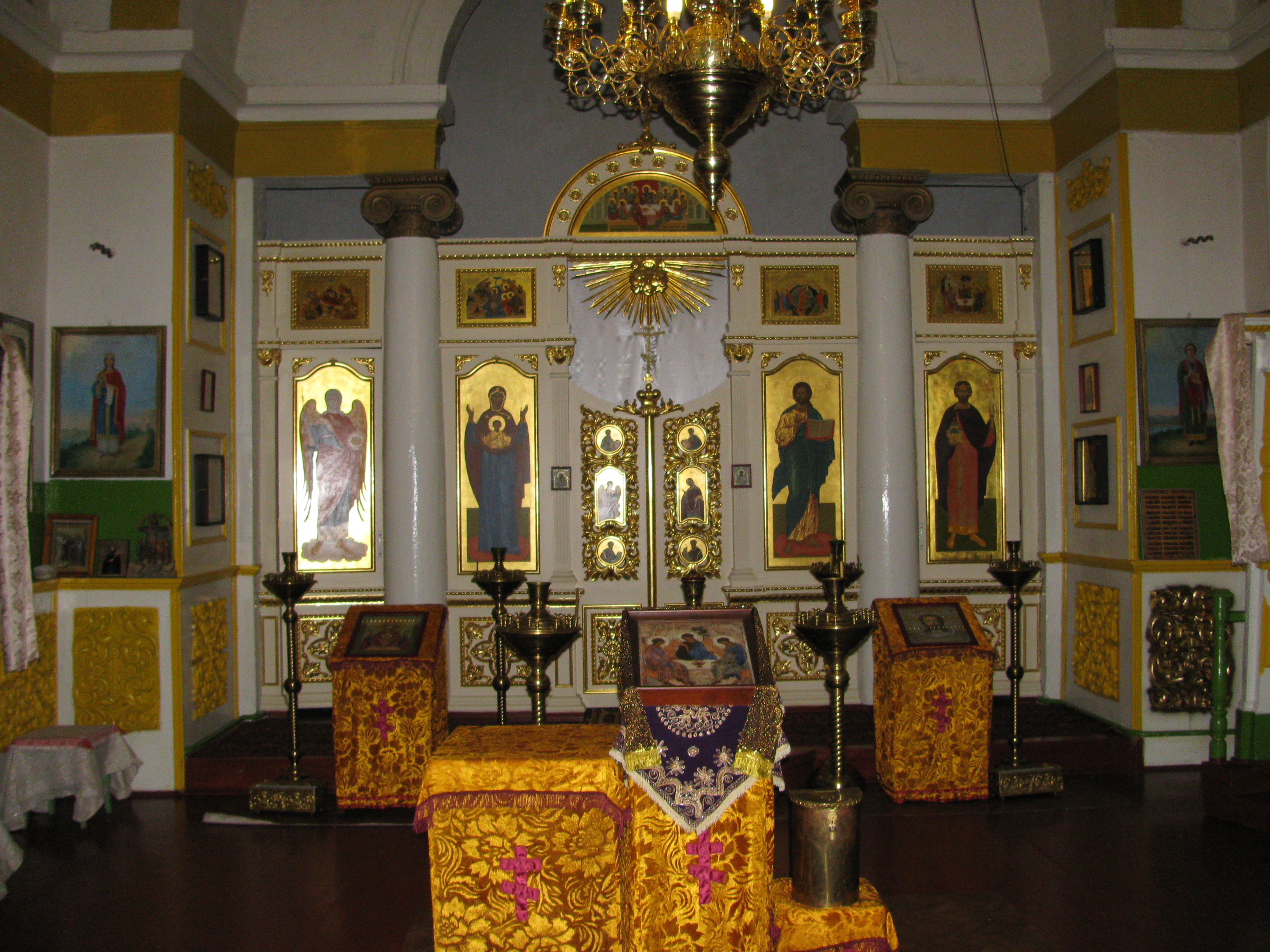 Беларуская (тарашкевіца): Спаская царква. г. п. Арэхаўск This is a photo of Belarusian heritage monument. Reference number: 213Г000126 ( WLM)